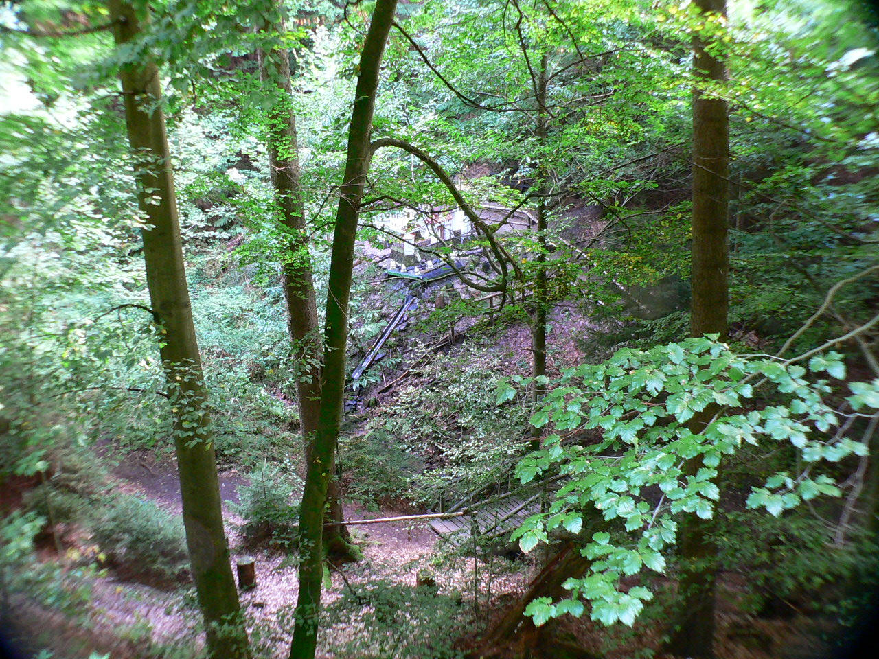 Blick in die Obrunnschlucht bei Höchst im Odenwald